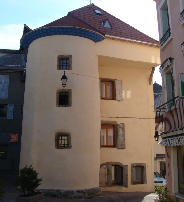 La maison de la tour, place Grenette, restaurée en 2010.